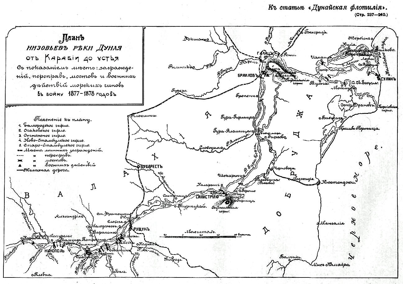 Это изображение было использовано для иллюстрирования статьи «Дунайская флотилия» опубликованной в девятом томе «Военной энциклопедии», который был издан книгоиздательским товариществом И. Д. Сытина в 1912 году в столице Российской империи городе Санкт-Петербурге.